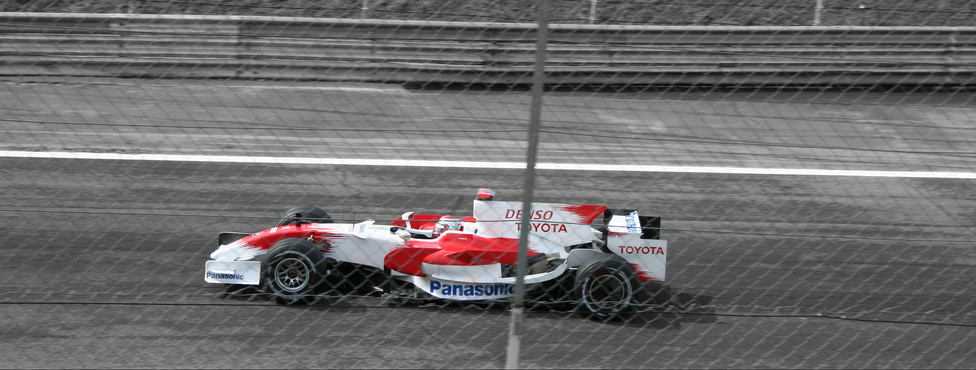 Jarno Trulli, Toyota. Monza's circuit - 2nd free practice - September 12, 2008 (peccato per le reti)